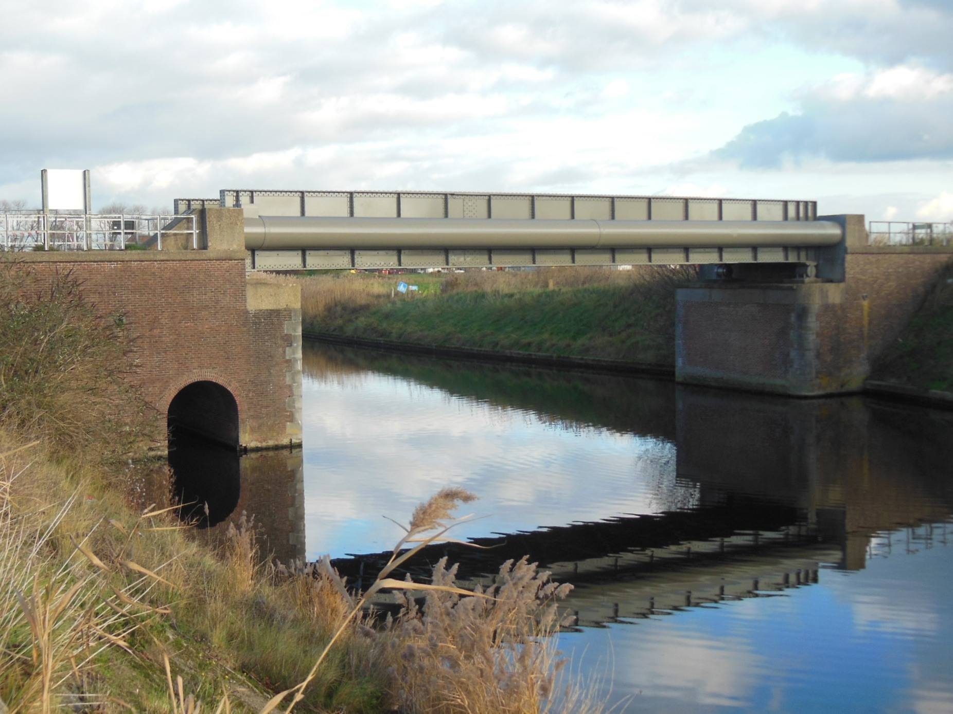 Stalen spoorwegbrug in de spoorlijn N74, nu brug in de Frontzate